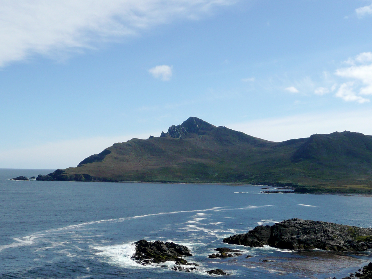 Cap Horn, le rocher face nord-est, vue à partir de l'île Horn